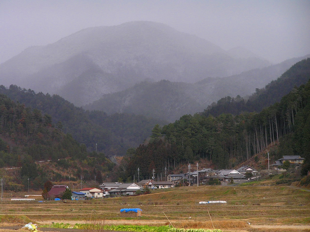 多紀連山（たきれんざん）は、京都府から篠山市、丹波市にかけて高い岸壁状に連なる500m～700mの山々の総称で、旧多紀郡にちなみ多紀アルプスとも呼ばれる。主峰は御嶽（793m）で西ヶ嶽（727m）、小金ヶ嶽（725m）の3つの峰が中心となっている。